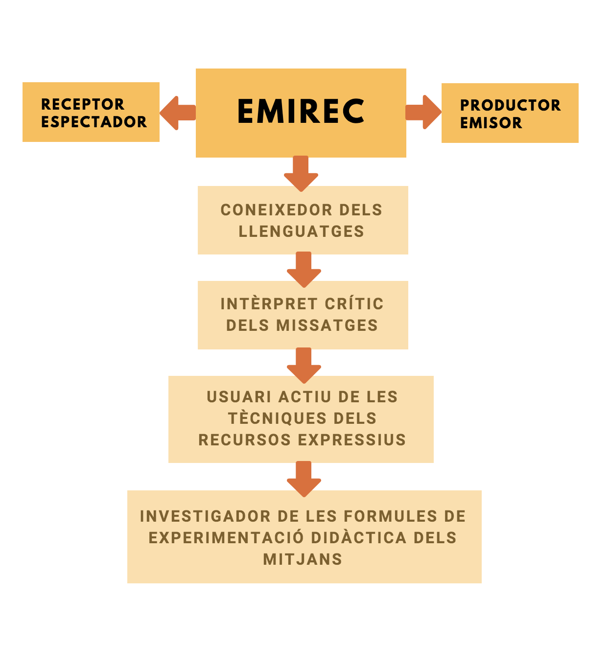 Aquest esquema resumeix les diverses funcions acumulatives de l'EMIREC